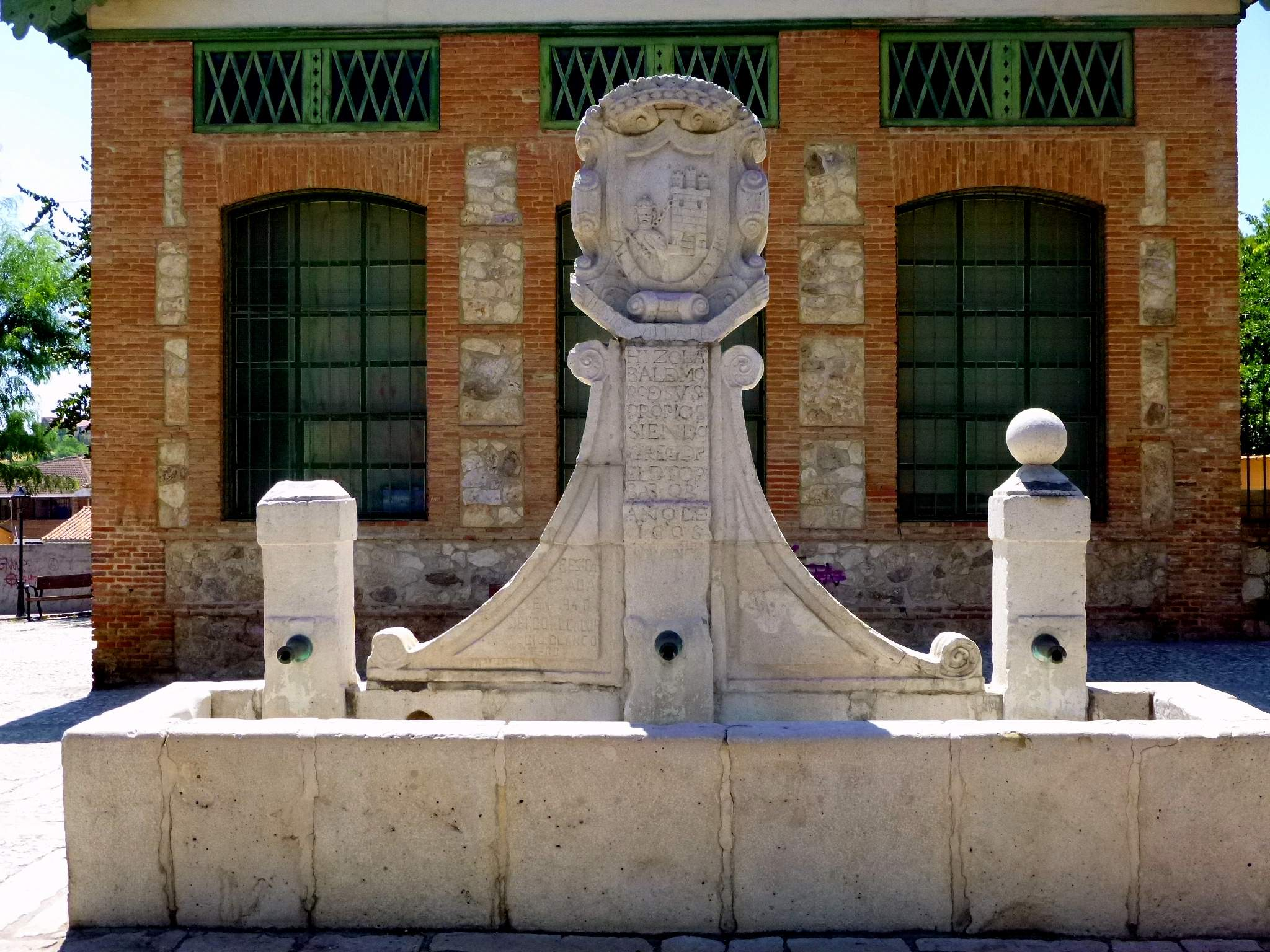 Valdemoro - Fuente de la Villa